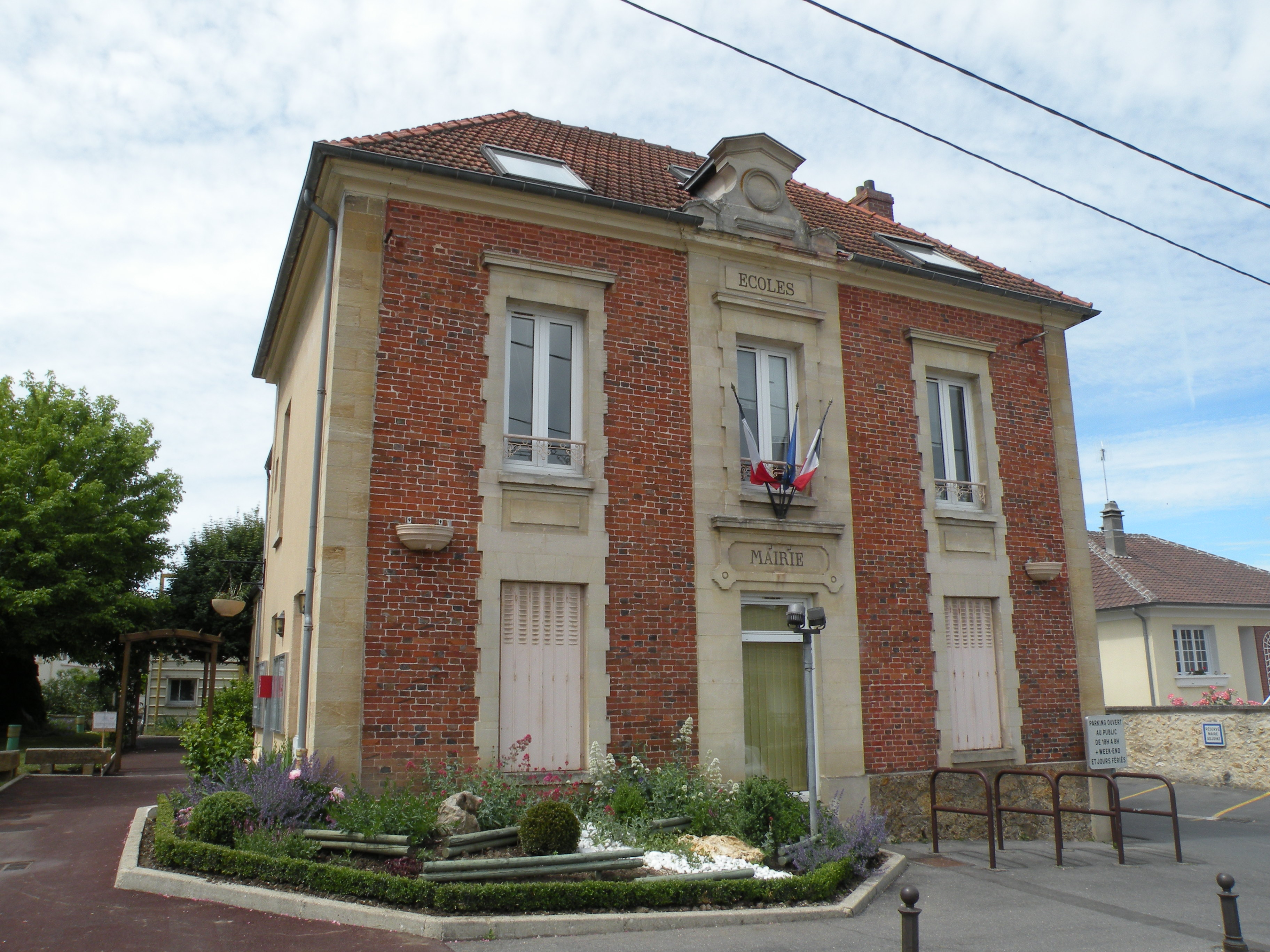 mairie de Menucourt